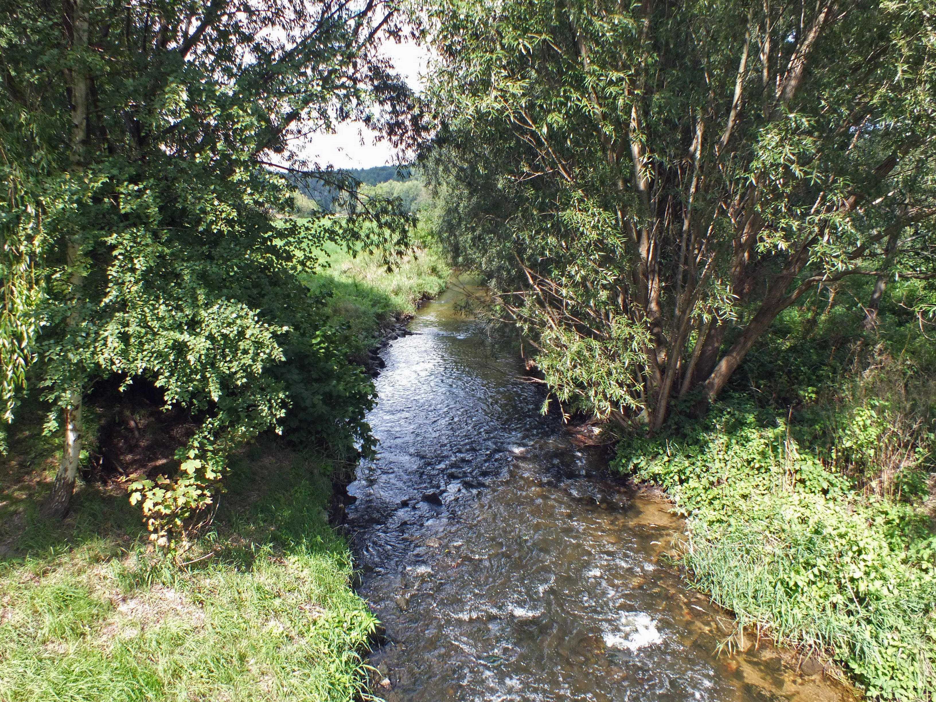 Die Eula bei Kitzscher